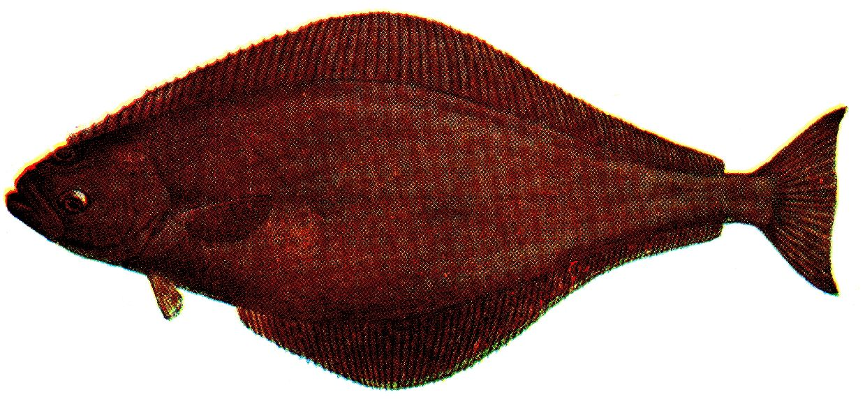 Halibut (Hippoglossus hippoglossus)